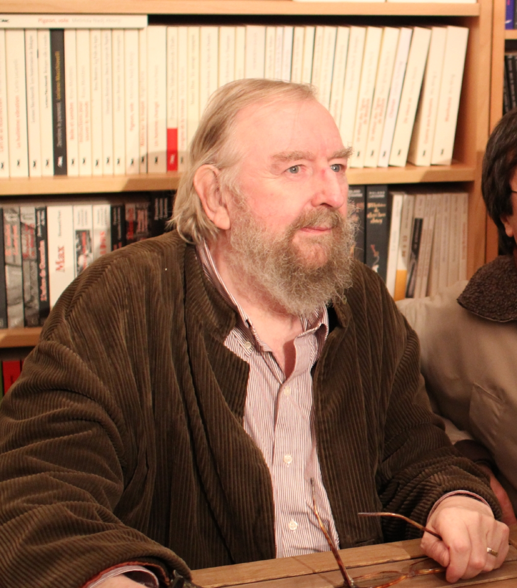 Michael Moorcock à la librairie Charybde, Paris, France, le 14/10/2012